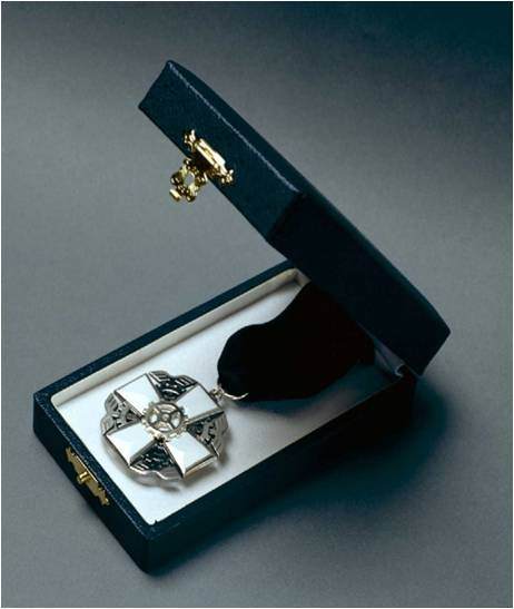 Keskuskauppakamari voi maan elinkeinoelämän tunnustuksena myöntää valkoiseksi emaloidun ja hopeisen kauppakamarin ansioristin (”kauppakamariristin”) ansiokkaasta toiminnasta kauppakamarissa tai Keskuskauppakamarissa tai muutoin ansiokkaasta kauppakamarin toiminta-alueen tai koko maan elinkeinoelämän toimintaedellytysten kehittämisestä. Esityksen kauppakamarin ansioristin myöntämisestä tekee kauppakamari tai Keskuskauppakamari.